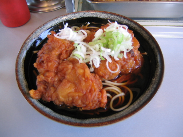 2007年6月27日 JR我孫子駅「弥生軒」にて投稿者により撮影